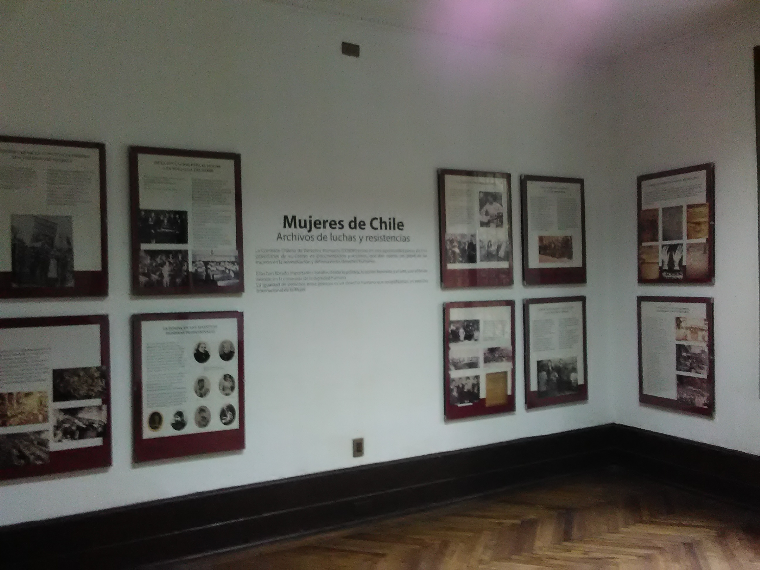 Ubicado en Santiago de Chile, frente al cerro del mismo nombre, fue usado como lugar de torturas y de desaparición de personas durante los primeros años del Régimen Militar.